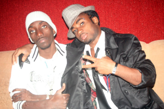 Description les danseurs de Dj Arafat DateSourceSelf-photographedAuthorUtilisateur:Francky Dicaprio les danseurs de Dj Arafat